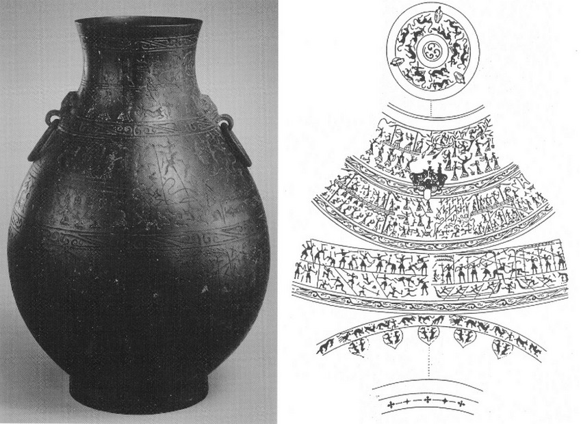 Récipient en bronze hu, et dessin de l'ornementation. Anonyme du VIe-Ve siècle avant J.C. : Musée impérial de Beijing.